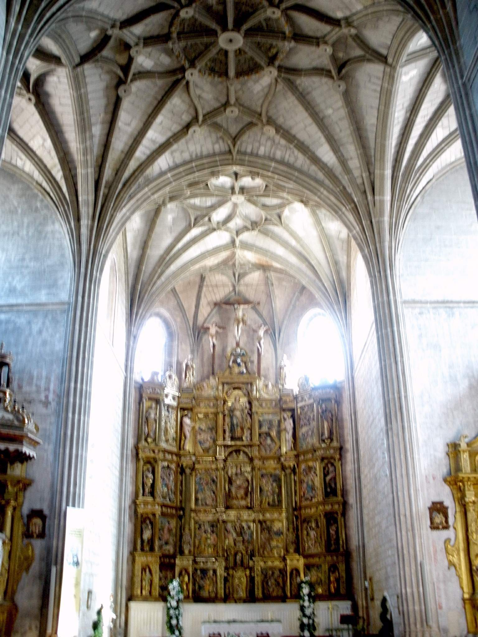 Iglesia de San Pedro (Pampliega, Burgos)